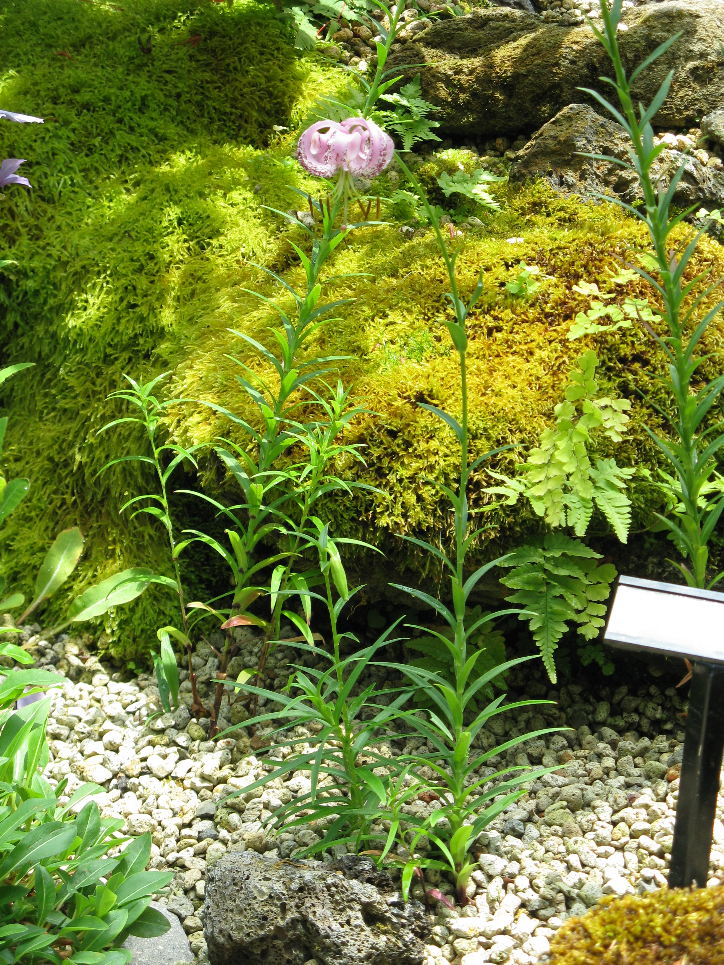 Scientific name Lilium lankongense Place:Sakuya Konohana Kan,Osaka,Japan